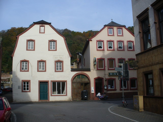 Alte Giebelhauser, Ehrang (Old Gabled Houses, Ehrang)